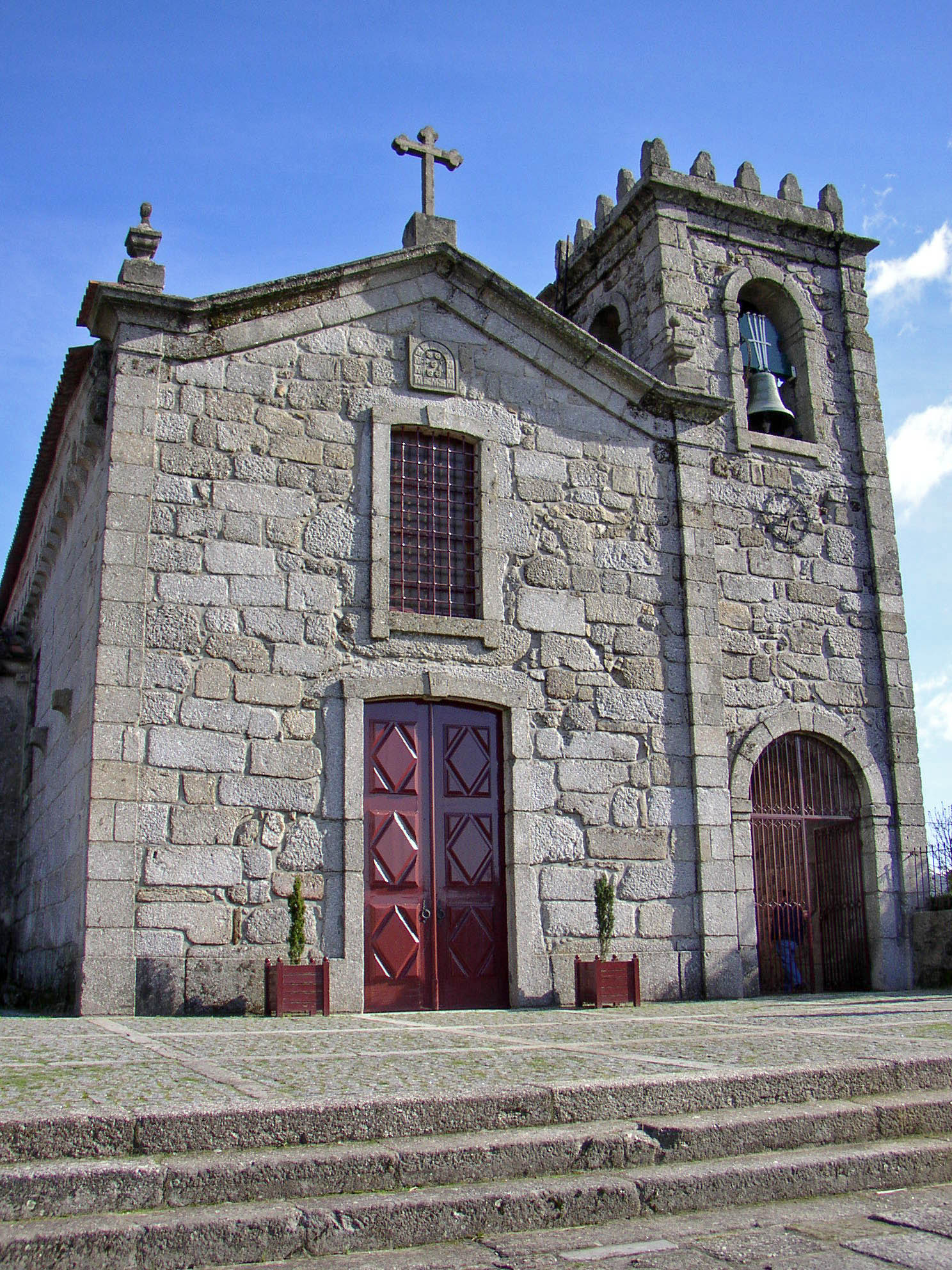 Capela de São Torcato ou Igreja do Mosteiro de São Torcato